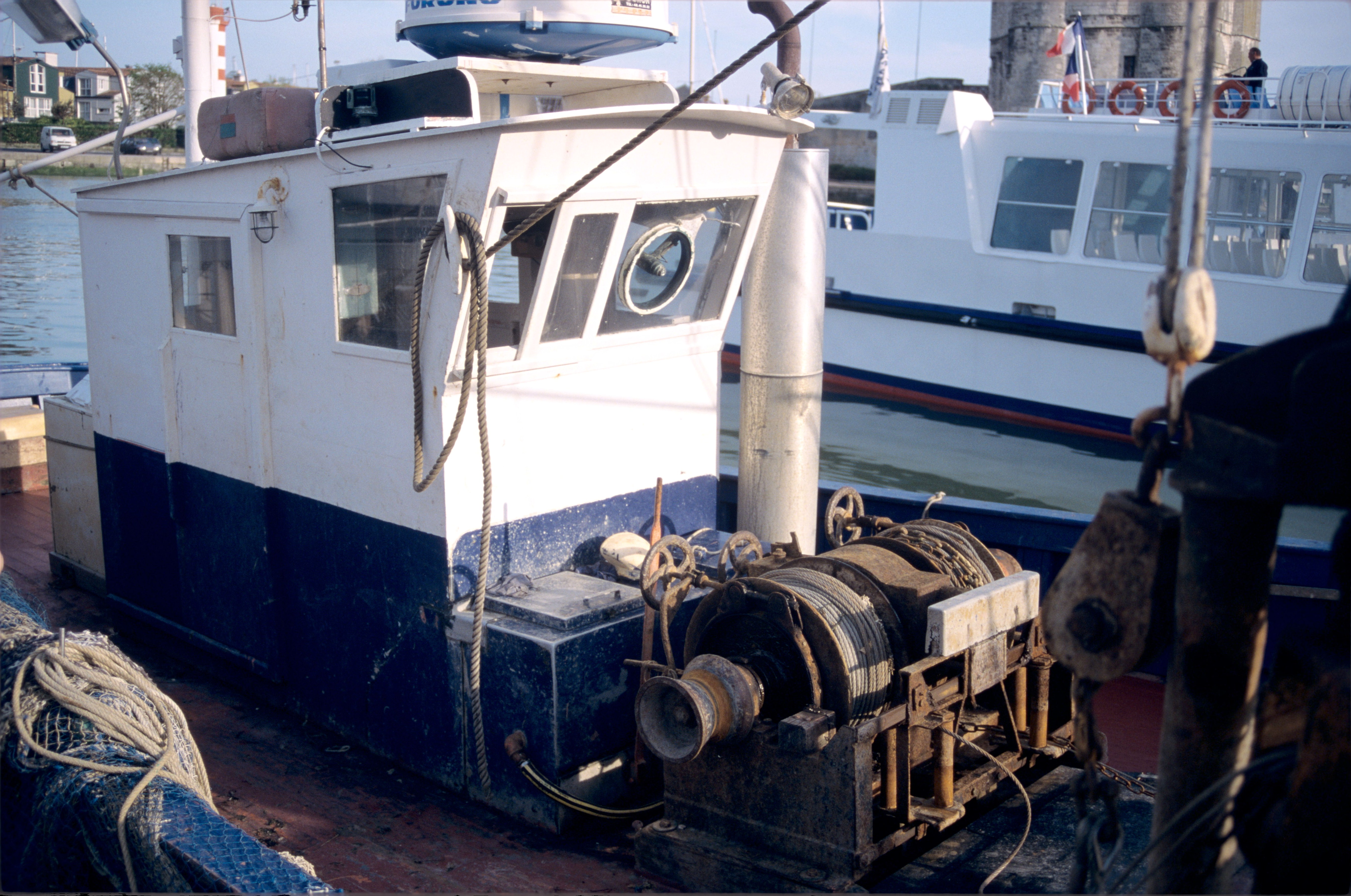 Cette photographie représente la timonerie (cabine où sont les instruments de navigation) d'un petit chalutier de pêche côtière et le treuil de traction motorisé qui sert à remonter le chalut. Port de La Rochelle, Charente Maritime, France.